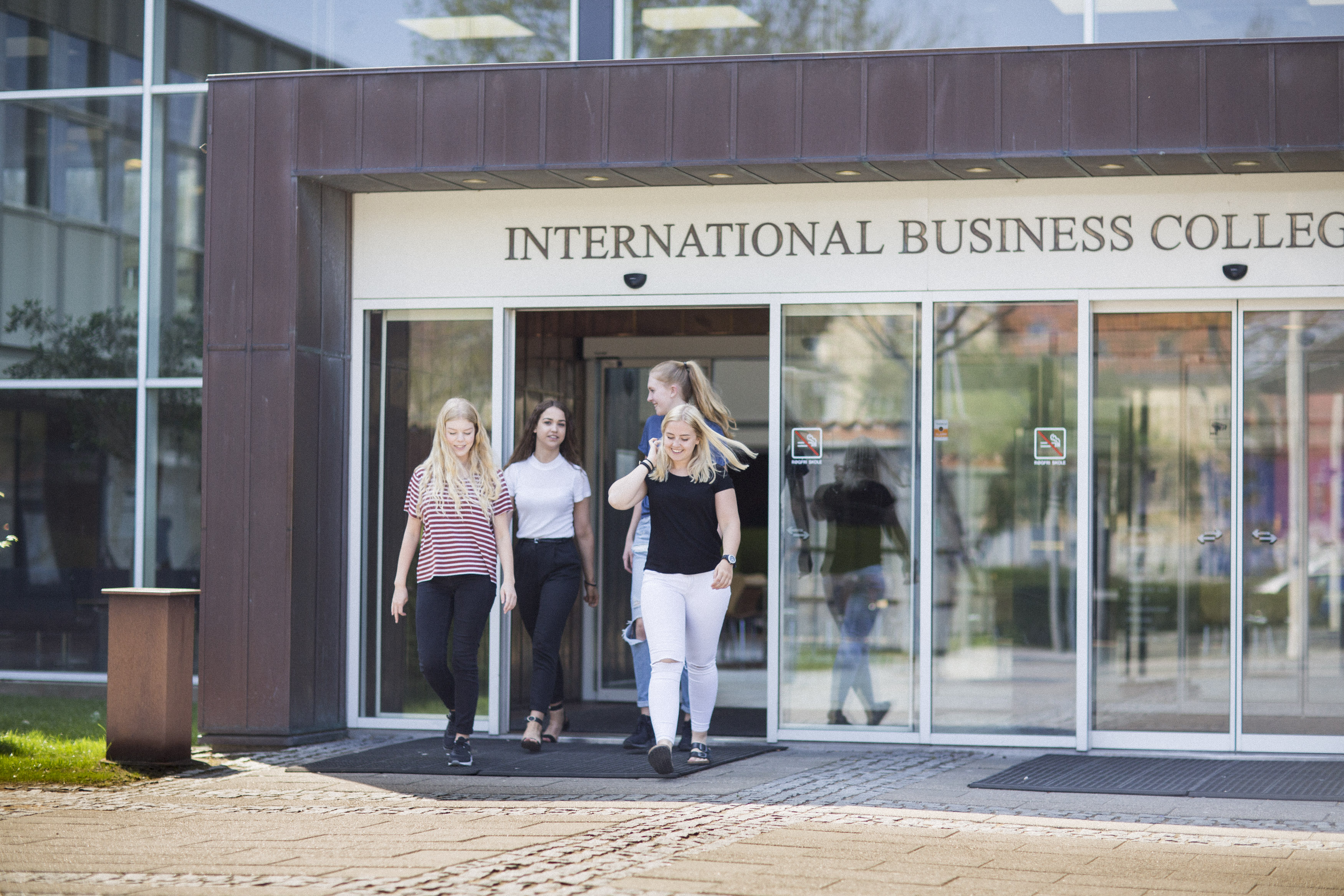 IBC Aabenraa